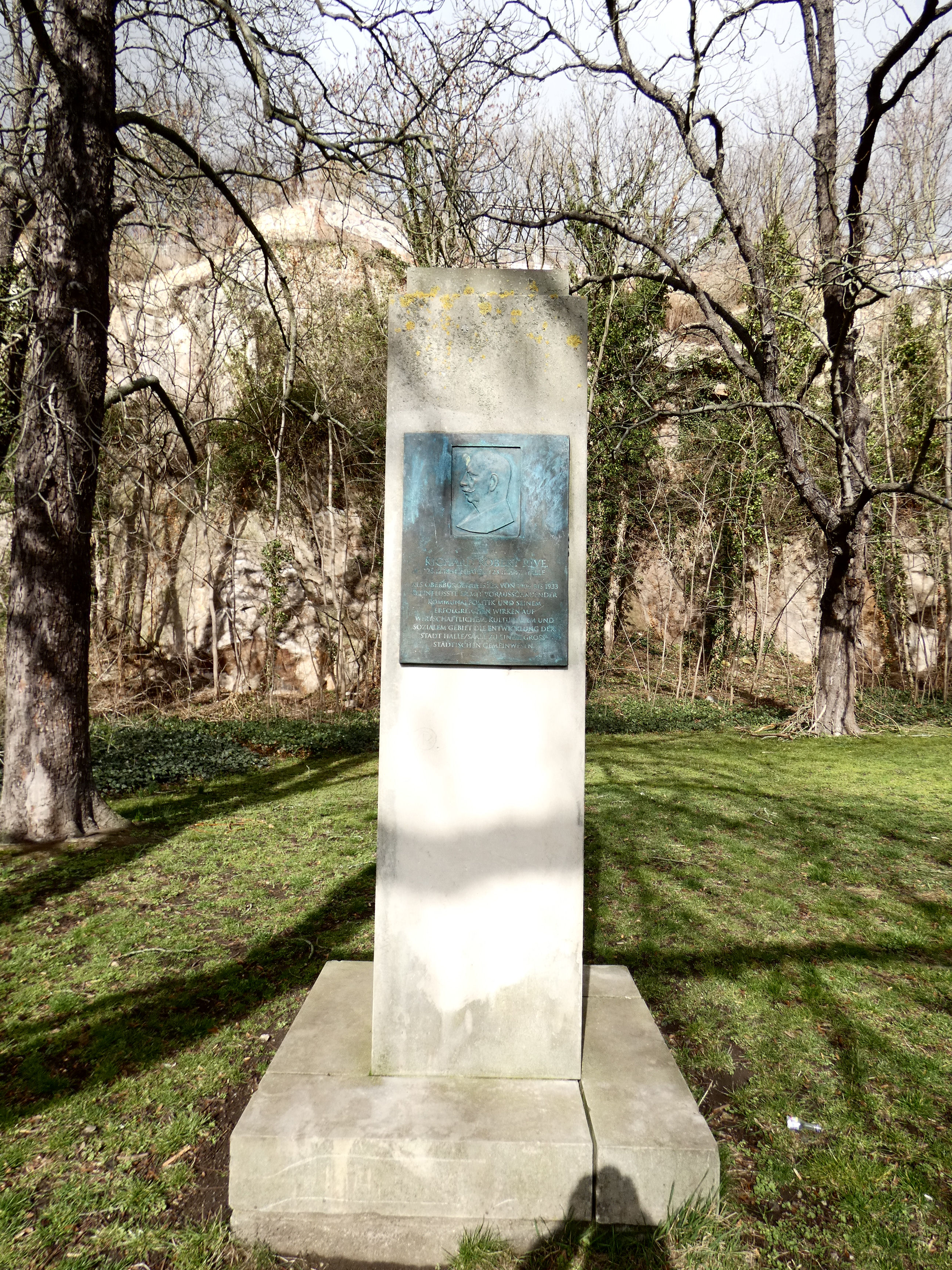 Stele mit Bronzerelief für Richard Robert Rive, Oberbürgermeister von 1908 bis 1933, Riveufer, Halle (Saale)